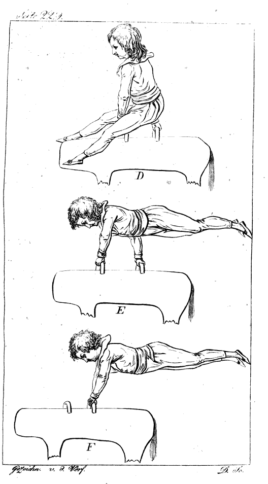 Illusztráció. 1793-ban Johann Christoph Friedich Guths Muths megjelentette Gymnastic für die Jugend (Gimnasztika az ifjúság számára) című művét, az első olyan tornászkönyvet, amelyben a testgyakorlatok „testen végzett munkává” váltak.